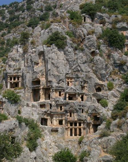 Beschreibung: Felsengräber von Myra, Lykien, Türkei Fotograf: Eigene Aufnahme von Benutzer:Sjoehest im August 2002. Lizenz: GNU freie Dokumentationslizenz. Bild:Felsengräber von Myra.JPG